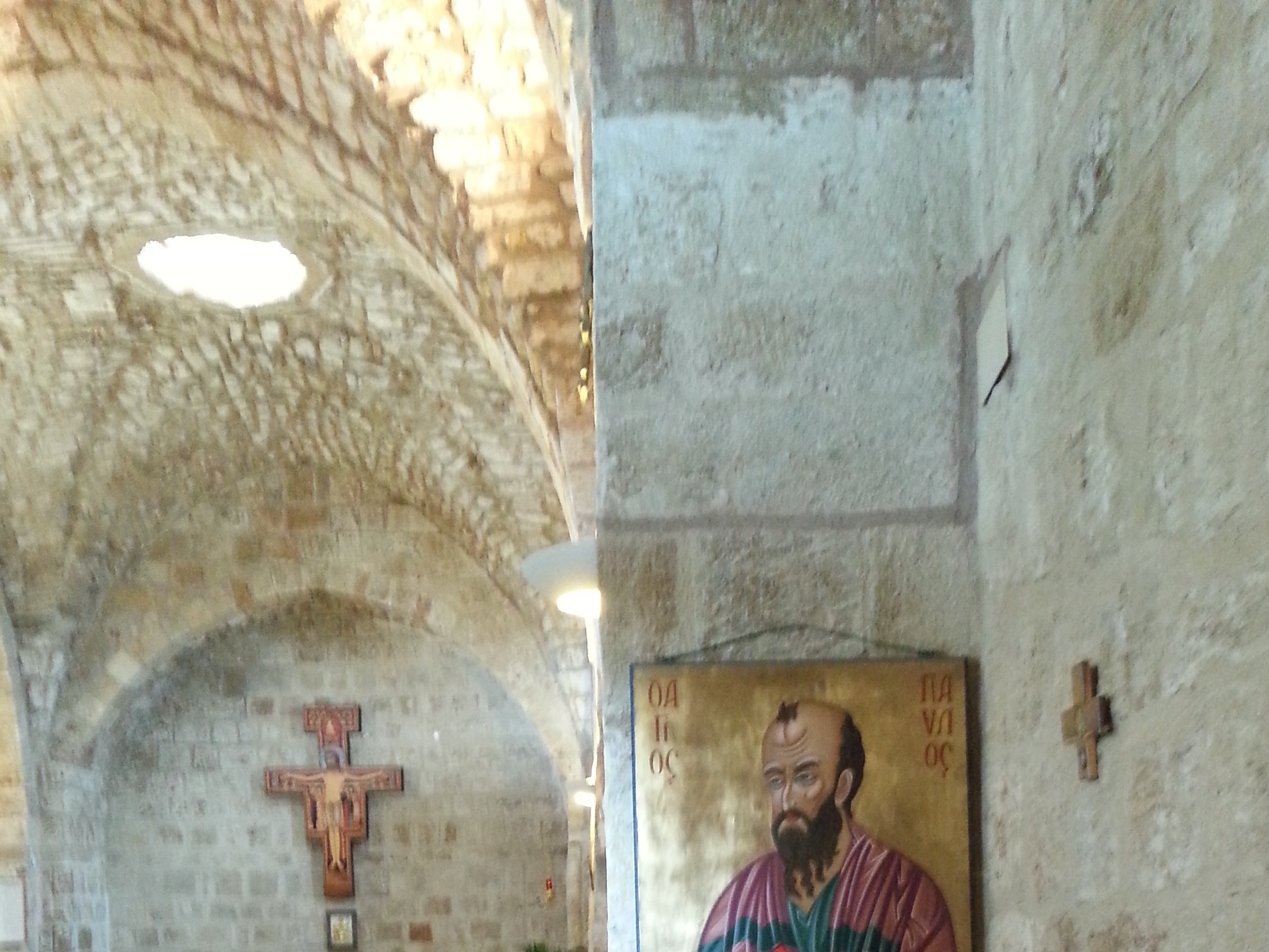 Franziskanerkirche St. Johannis Baptistae in Akko, Israel, Blick ins Gewölbe des dritten Jochs mit Öffnung zur Laterne überm Scheitel